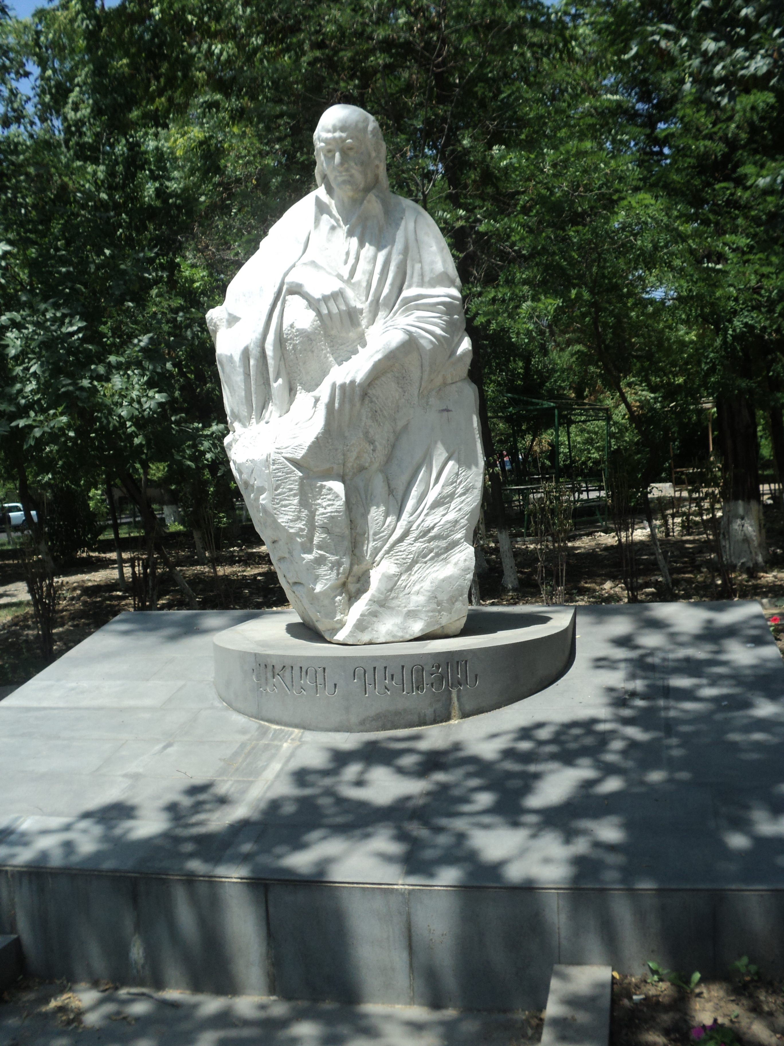 Վահագն Դավթյան Հեղինակ` Լևոն Թոքմաջյան: 2010 Գտնվում է Կոմիտաս պողոտայի և Նաիրի Զարյան փողոցի միջև ընգած զբոսայգում: 3/7